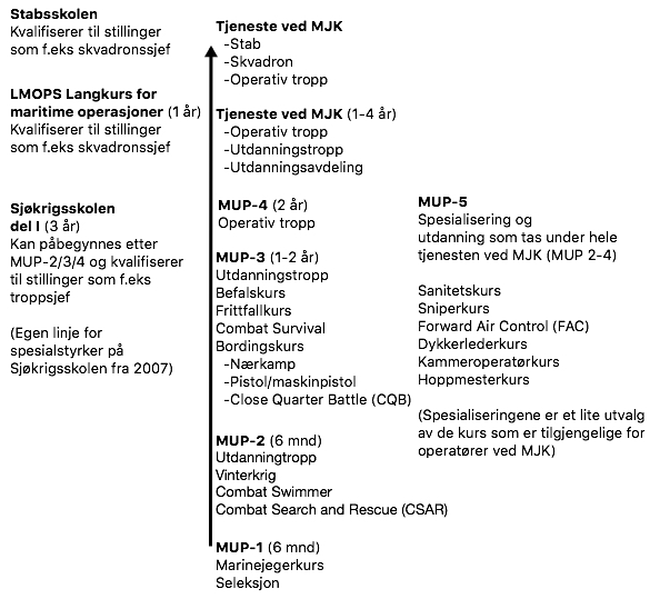 karrierevei marinejeger fra 2006/2007